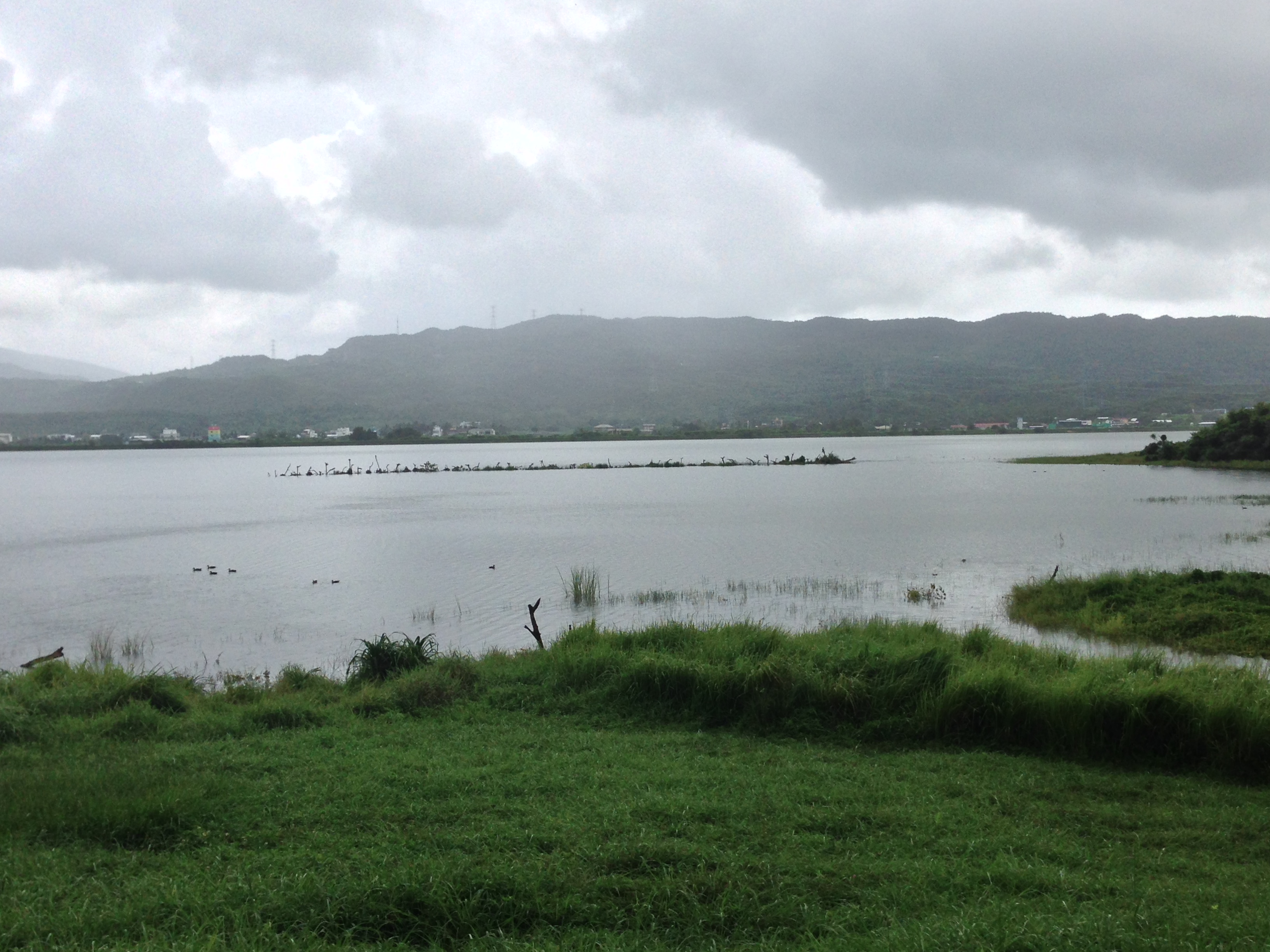 龍鑾潭水庫